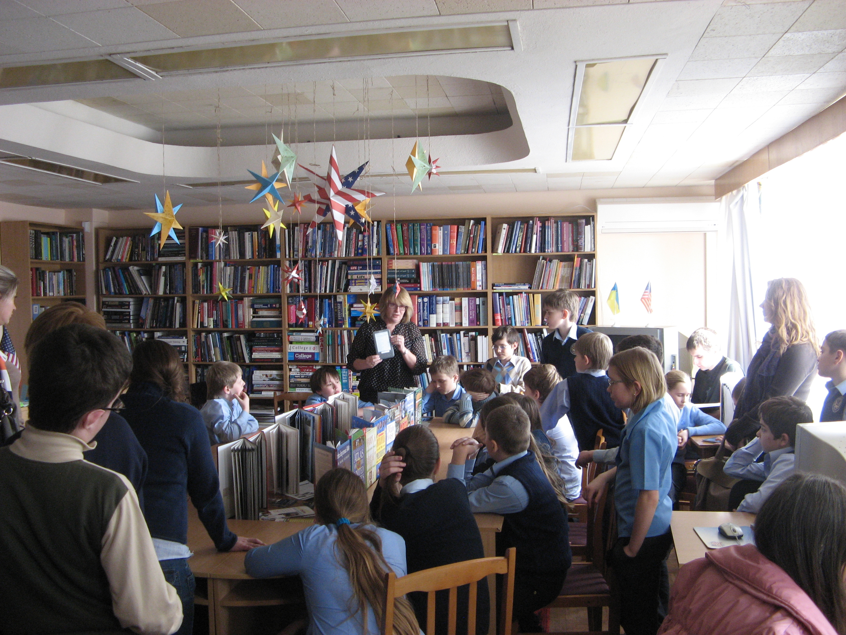 2013 рік. Інформаційна година «Іноземні мови у нашому житті» для учнів олександрівської гімназії